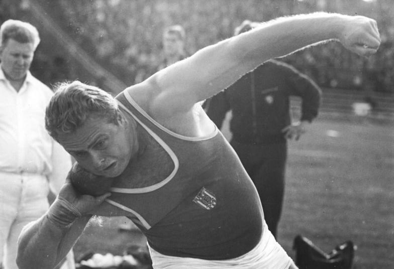 Dieter Prollius Zentralbild Wendorf 02.07.1967 Schwerin: Neuer Kugelstoßrekord durch Dieter Prollius. Als erster Kugelstoßer der DDR übertraf am 01.07.1967 bei der Vorrunde um den Klubpokal in Schwerin der 23jährige Dieter Prolius (SC Einheit Dresden_Archivfoto) die 19-m-Grenze. Prolius verbesserte in einer sensationelen Serie den bisherigen Rekord der DDR gleich viermal und steigerte sich auf 19,32 m. Seine Serie: 18,76m, ungültig, 18,81 m, 18,90 m, 19,32 m, ungültig. Die alte Rekordmarke stand bei 18,75 m (Dieter Hoffmann) .